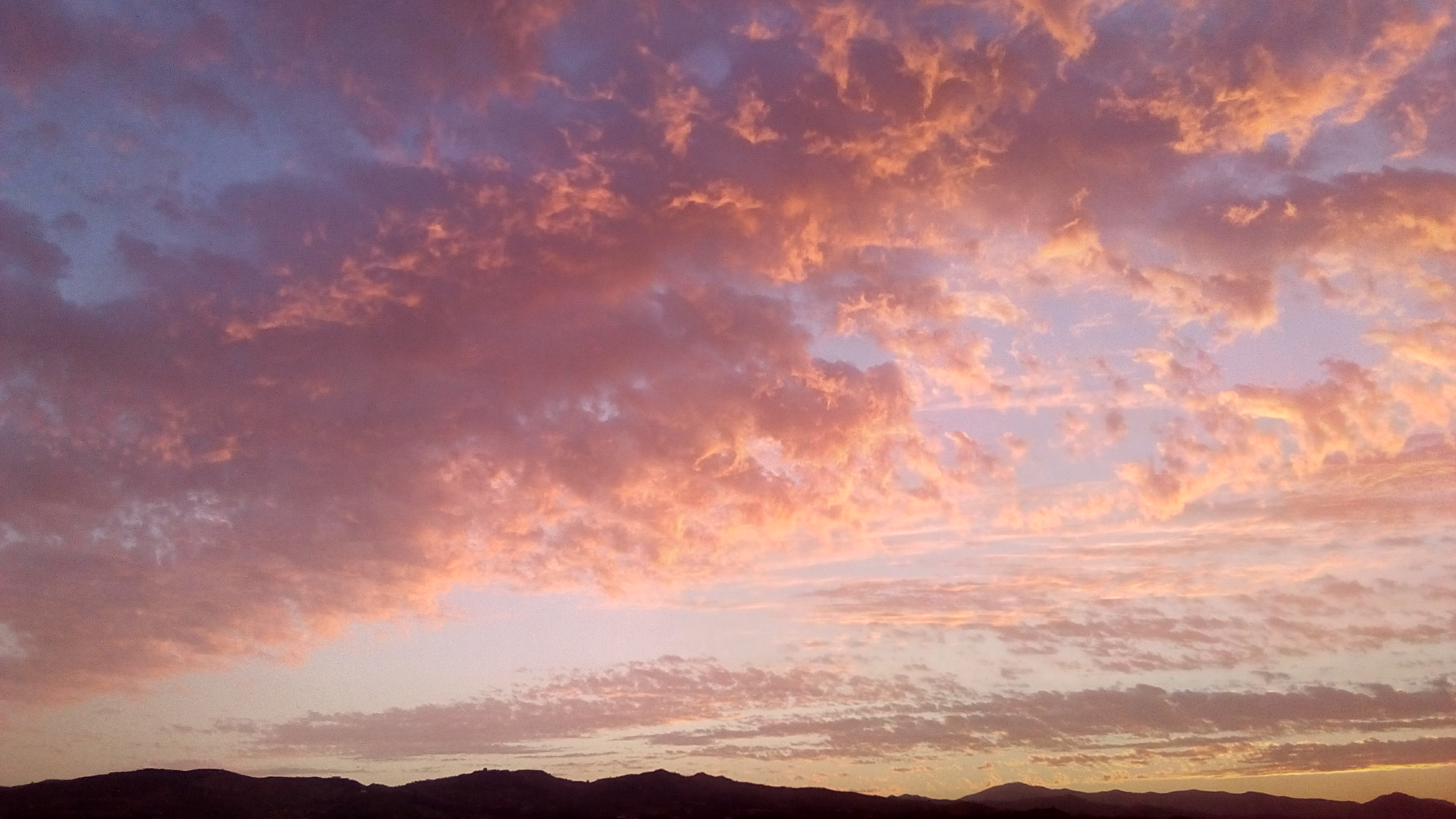 Atardecer Málaga